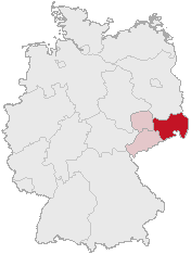 Regierungsbezirk Dresden in Saxony